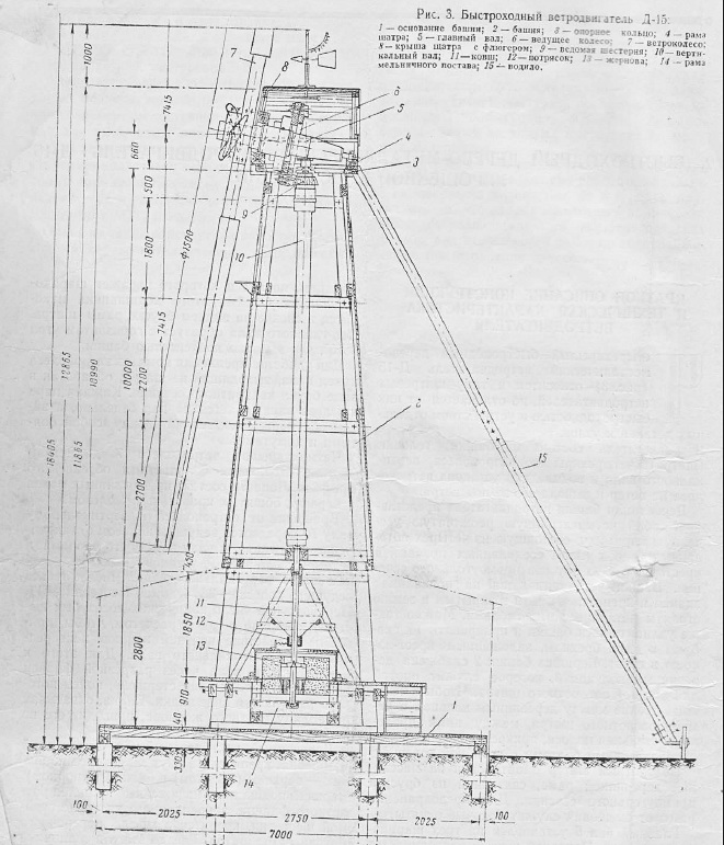 Схема вітряка